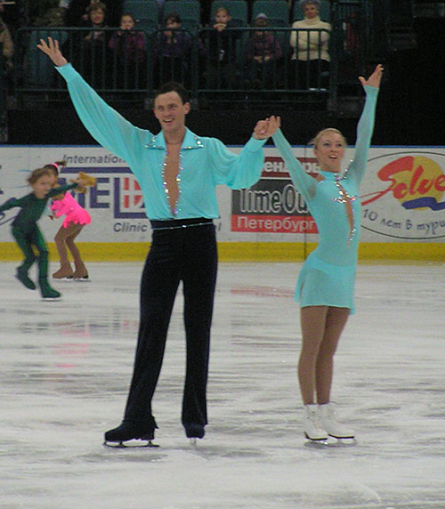 Tatiana Totmianina und Maxim Marinin während der Russischen Meisterschaften 2005